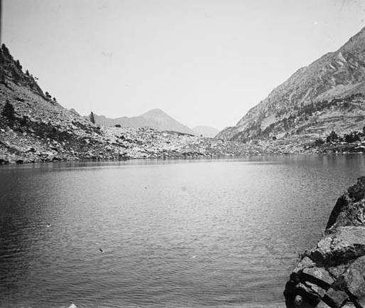 Imatge